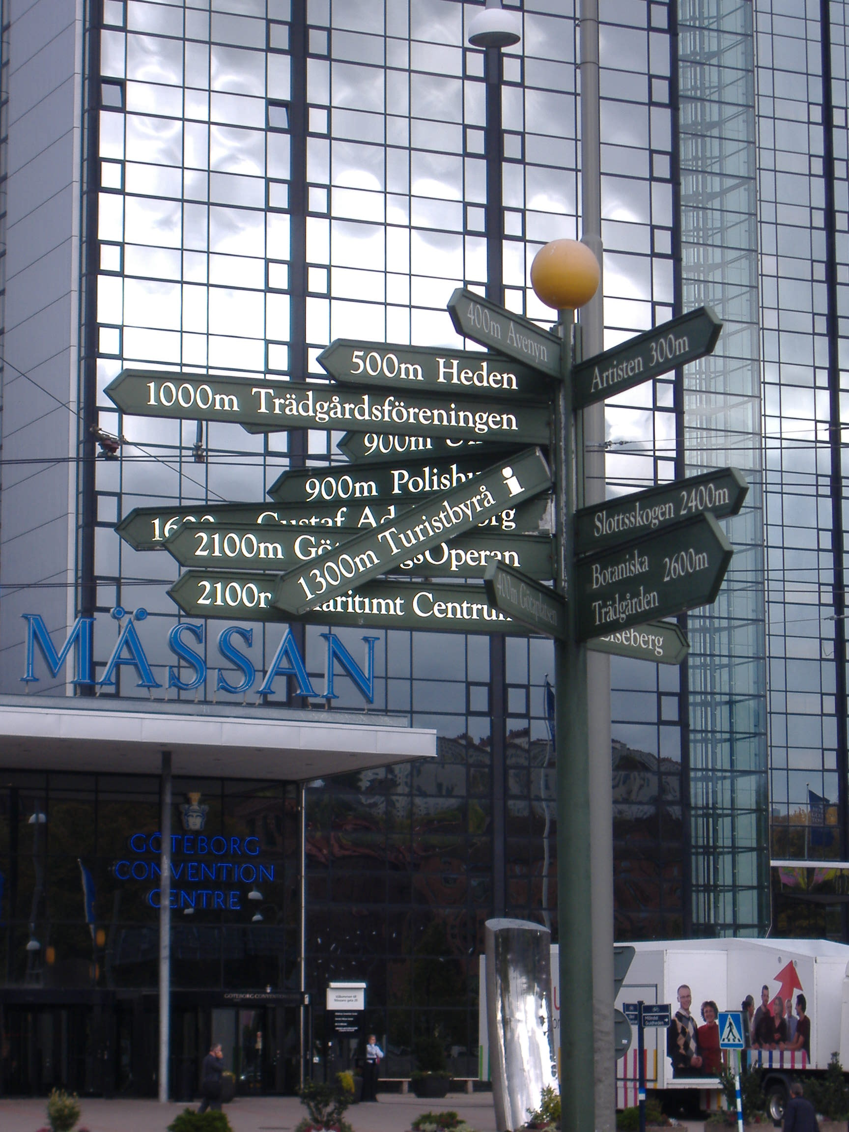 שלט רחוב בגטבורג, שבדיה